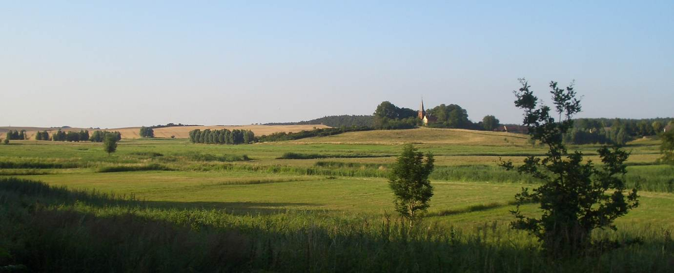 Blick auf das Naturschutzgebiet Binnensalzwiese bei Sülten.